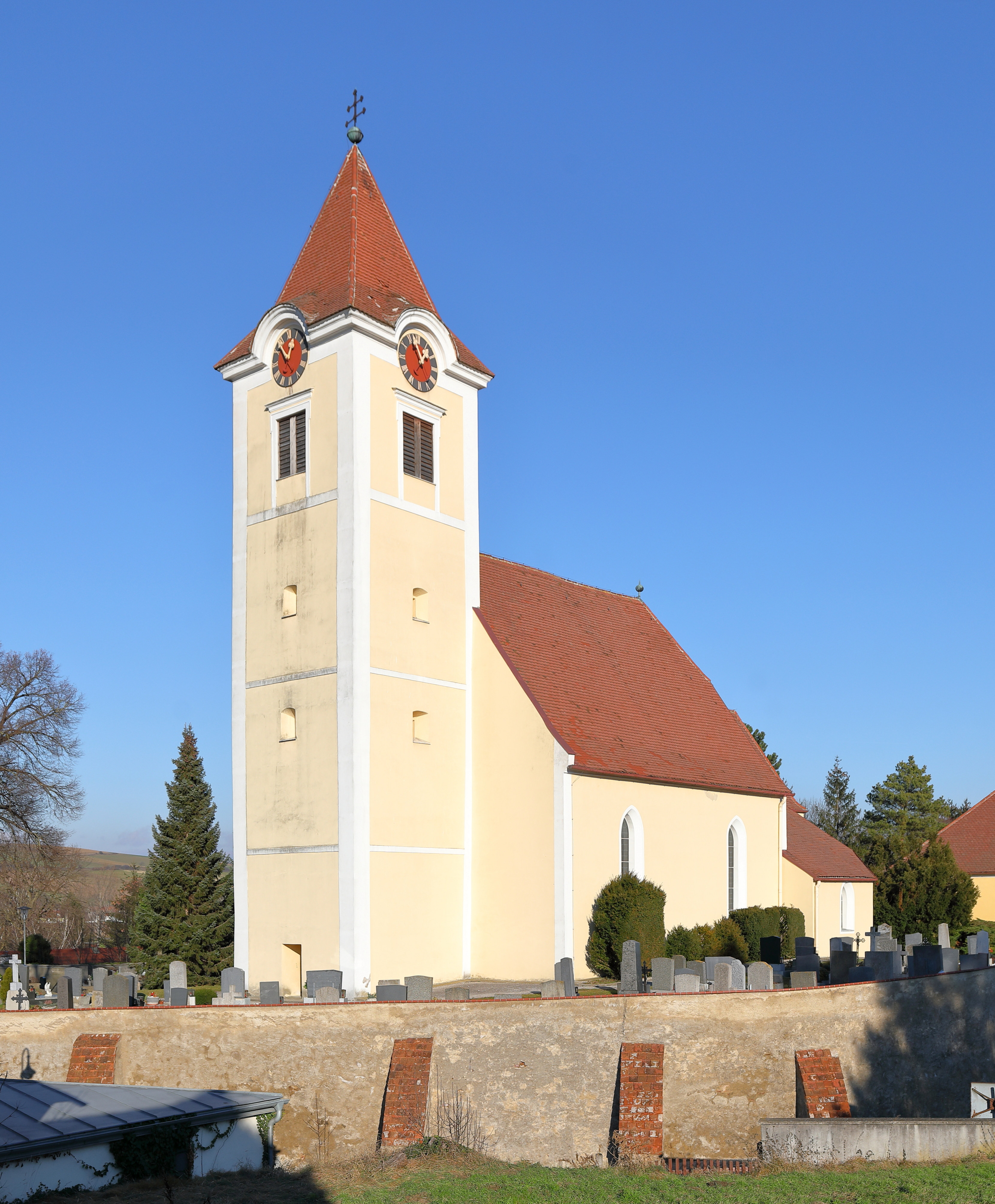 Südwestansicht der röm.-kath. Pfarrkirche hl. Martin in Abstetten, ein Ortsteil der niederösterreichischen Marktgemeinde Sieghartskirchen. Die barockisierte gotische Saalkirche mit mächtigem, weithin sichtbarem Westturm und eingezogenem Turm befindet sich erhöht in der Ortsmitte und ist von einem Friedhof mit Böschungsmauer umgeben.